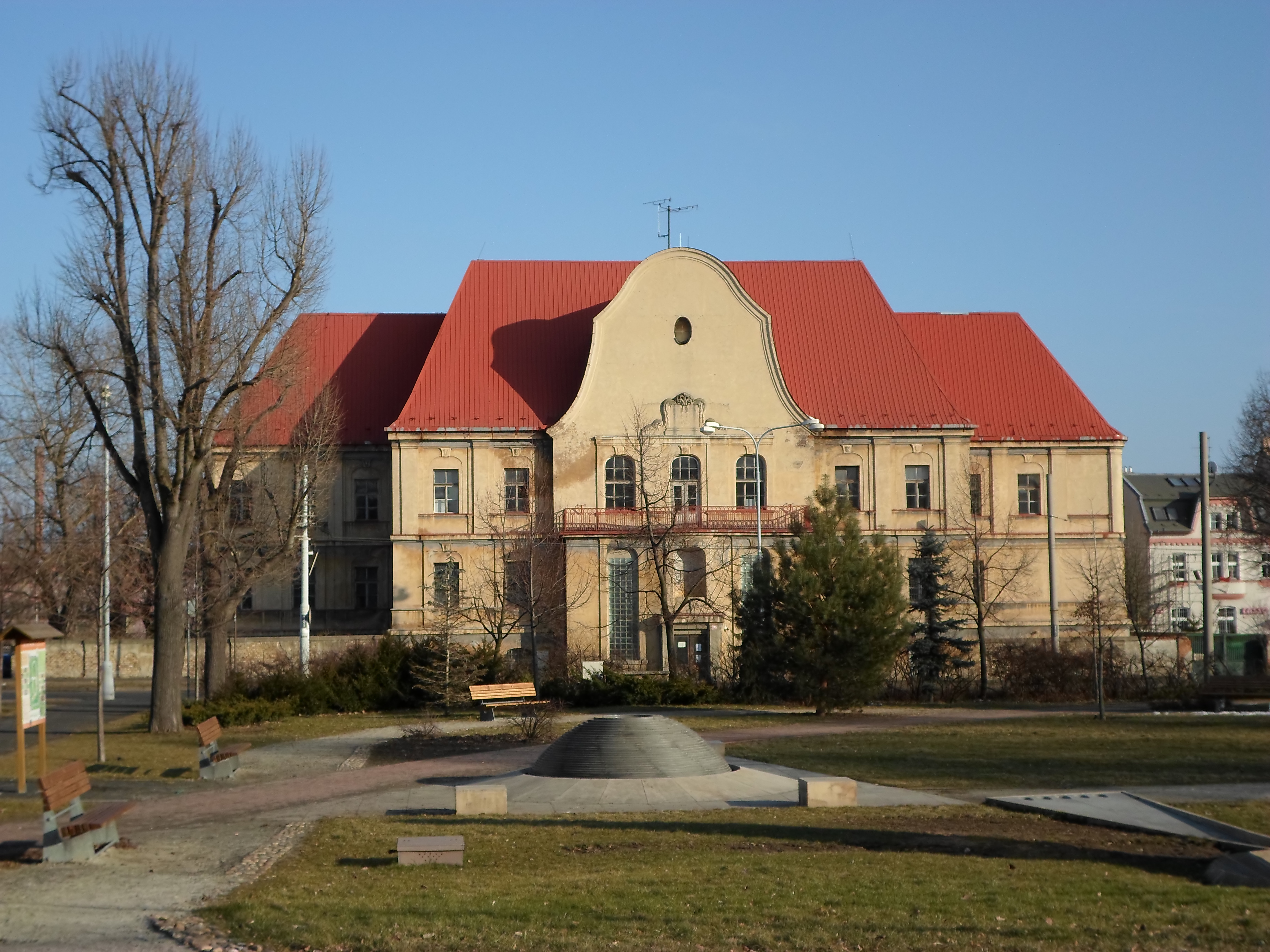 Chomutov - Chudobinec císařovny Alžběty, bývalá poliklinika